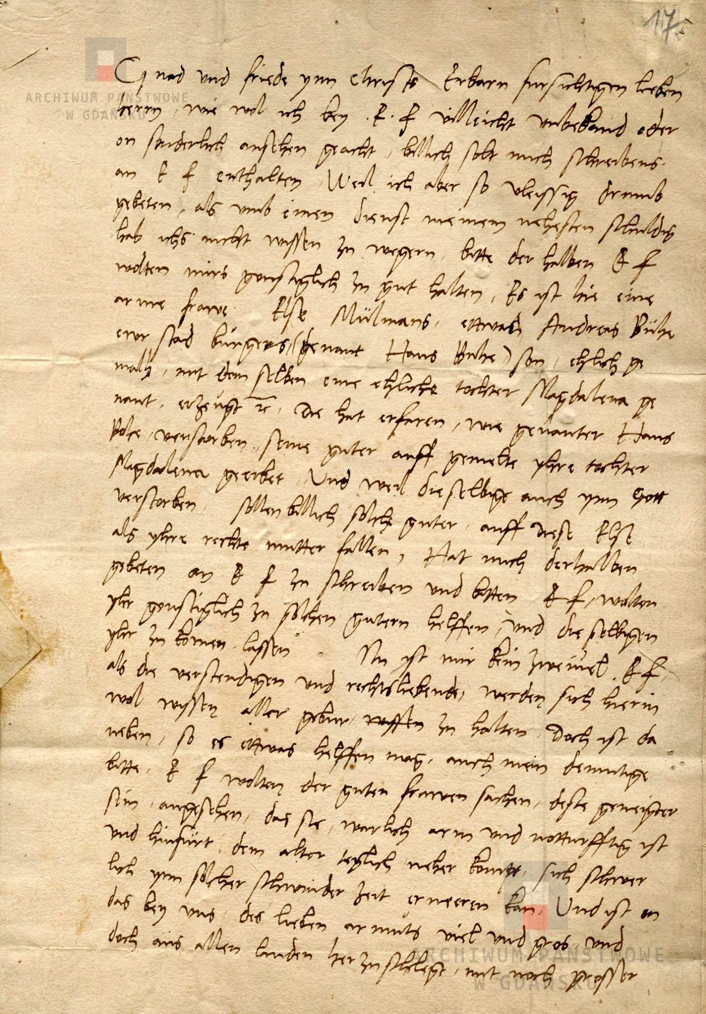 List Marcina Lutra z Wittenbergi do Rady miasta Gdańska w sprawie Else Bühe z domu Mülmans, w którym prosi on Radę miasta o udzielenie pomocy Elsie, wdowie po Andreasie Bühe, szczególnie z uwagi na biedę, w jakiej się ona obecnie znajduje, aby mogła odziedziczyć majątek należny jej po zmarłych dzieciach Magdalenie i Hansie - s. 1/2